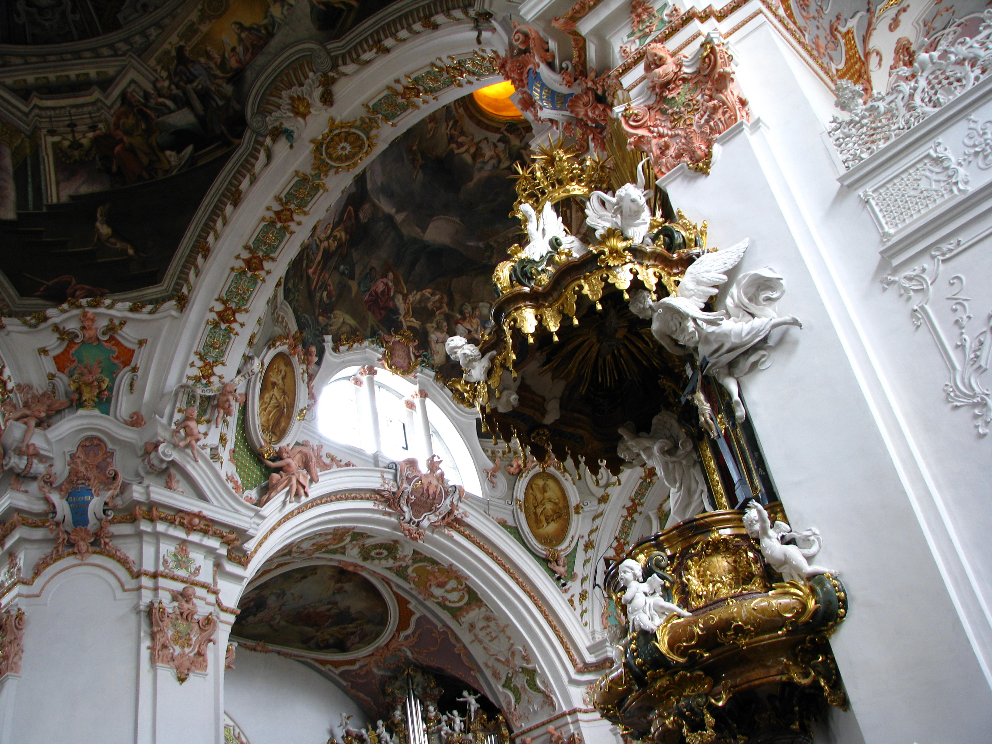 Abbey church in Einsiedeln (SZ) in Switzerland